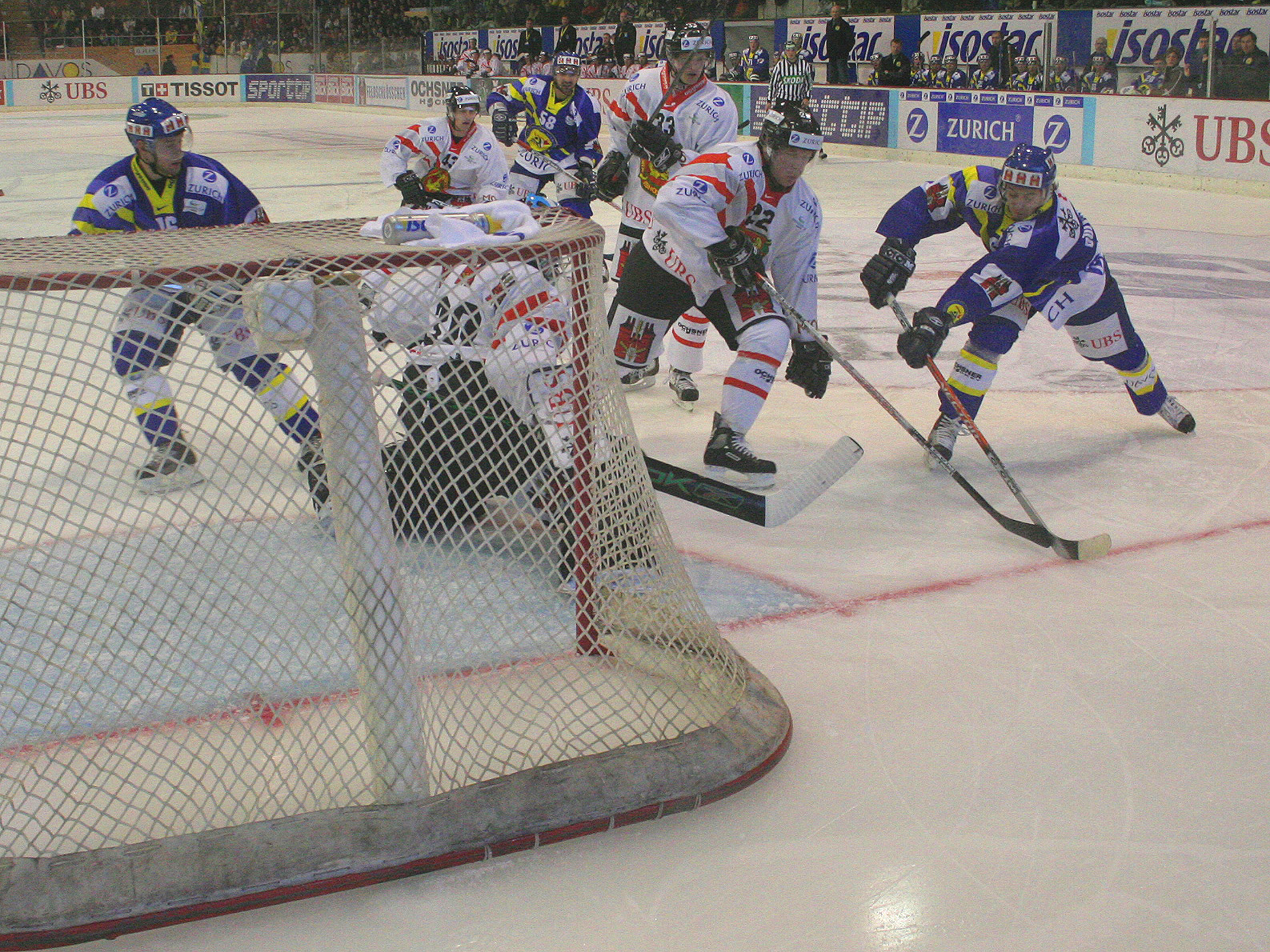 Spielszene während dem Spengler Cup 2006 zwischen Mora IK und Khimi